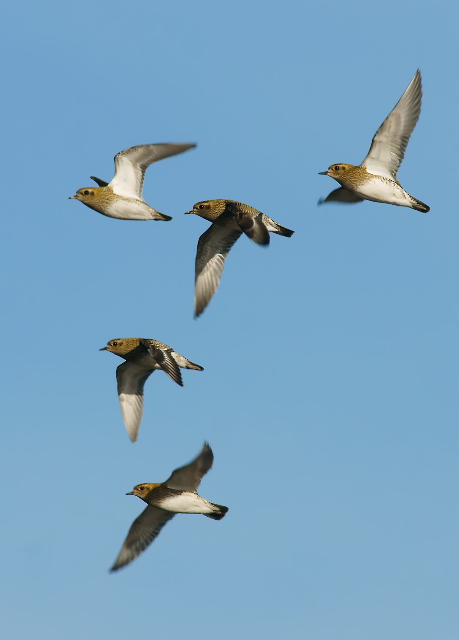 Chorlitejos dorados en vuelo - Eurasian golden plover - Pluvialis apricaria, Delta del Llobregat, Barcelona, Spain